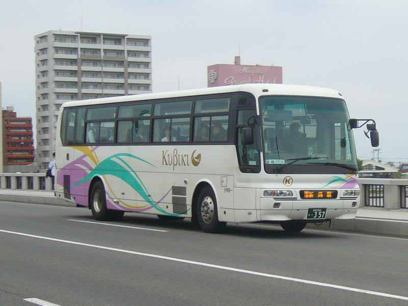 登録番号 長岡200か・357 頸城自動車所属 新潟～高田・直江津線用 2007年5月12日 万代橋にて撮影